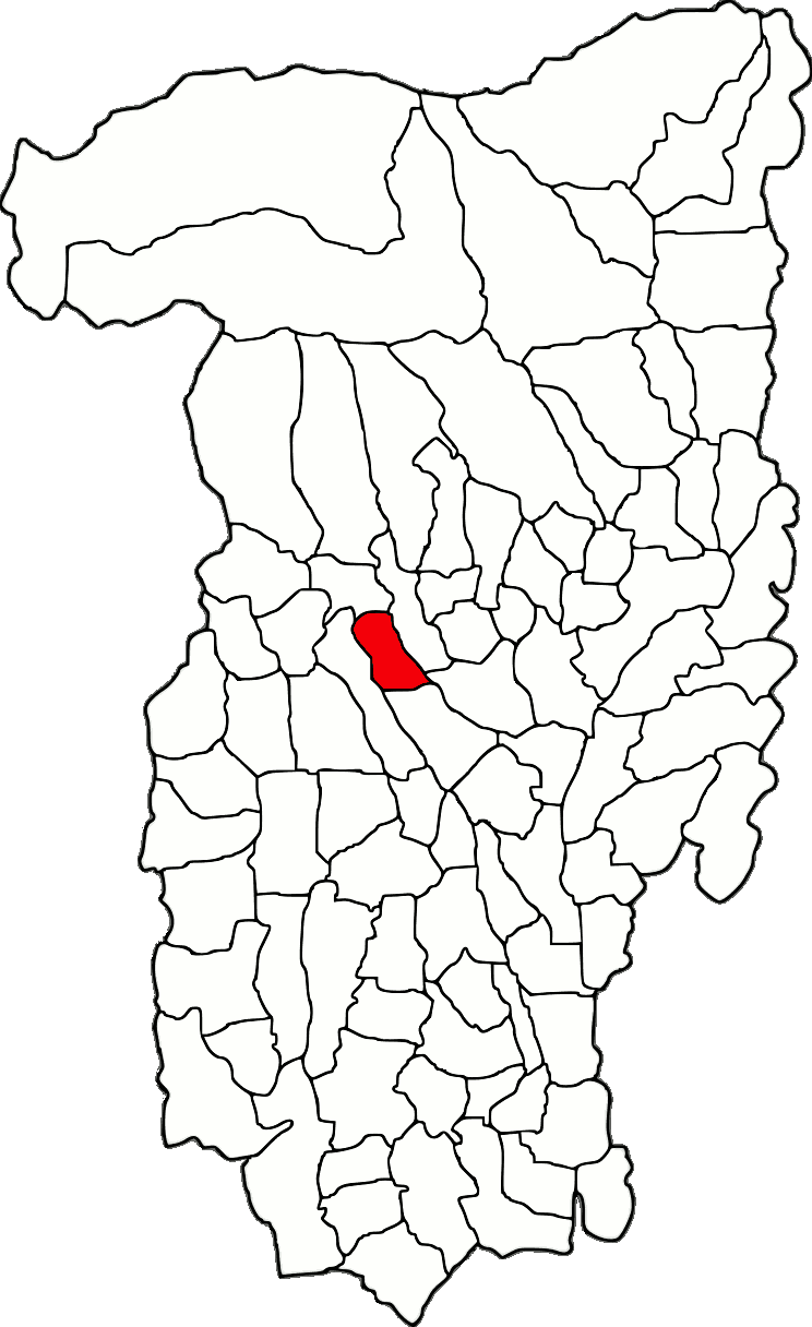 Lage der Gemeinde Oteșani im Kreis Vâlcea (RO).